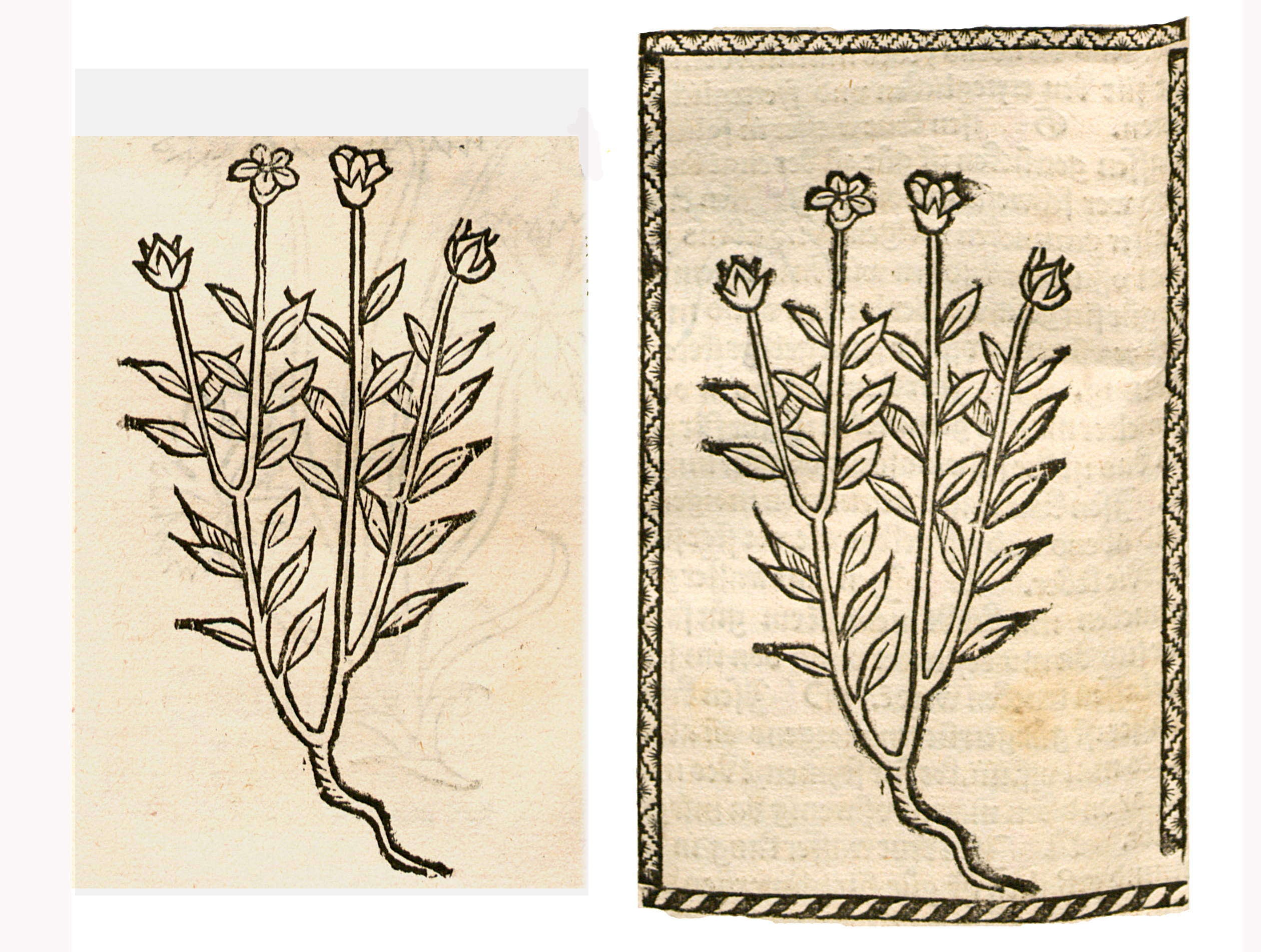 Abbildung von: Ysop (Hyssopus officinalis)